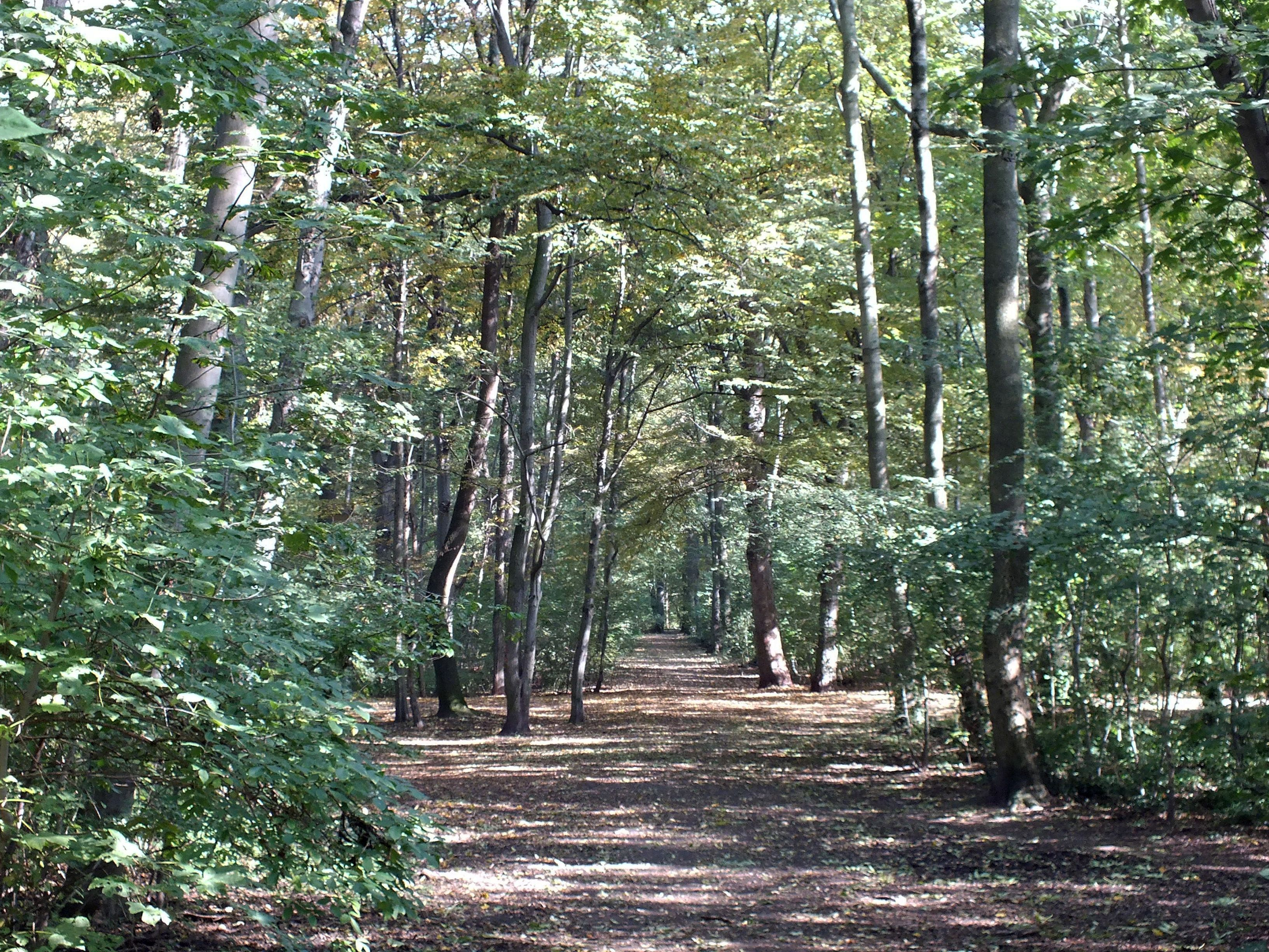 Spazierwege im Stötteritzer Wäldchen